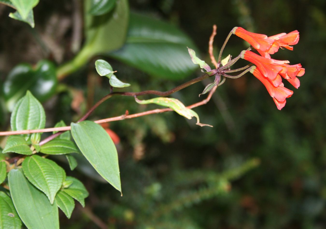 Bomarea hirsuta, Alstroemeriaceae - Costa Rica: Prov. Alajuela, Parque Nacional Volcán Poás, 2550-2600 m